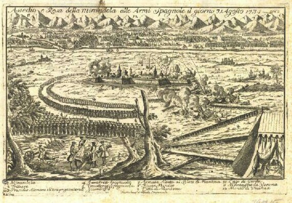 Assedio e resa della Mirandola alle armi spagnole il giorno 31 agosto 1735 (acquaforte, 317 mm. x 211 mm) Mirandola Tričiere Presidio Alemano ch'esce prigioniero Fanteria Spagnuola Cavalleria Spagnuola Fiume Po Armata Aleata al Bloco di Mantova Fiume Mincio Città di Mantova Lago di Garda Montagne di Verona Monti di Vicenza In Milano al Aquila Imperiale